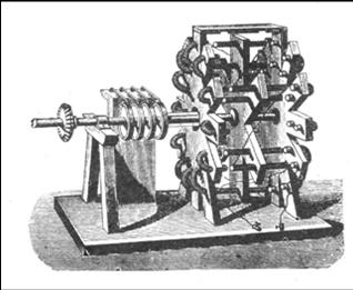 Gleichstrom-E-Motor, 1838 von Jacobi für das erste Elektro-Boot entwickelt und gebaut